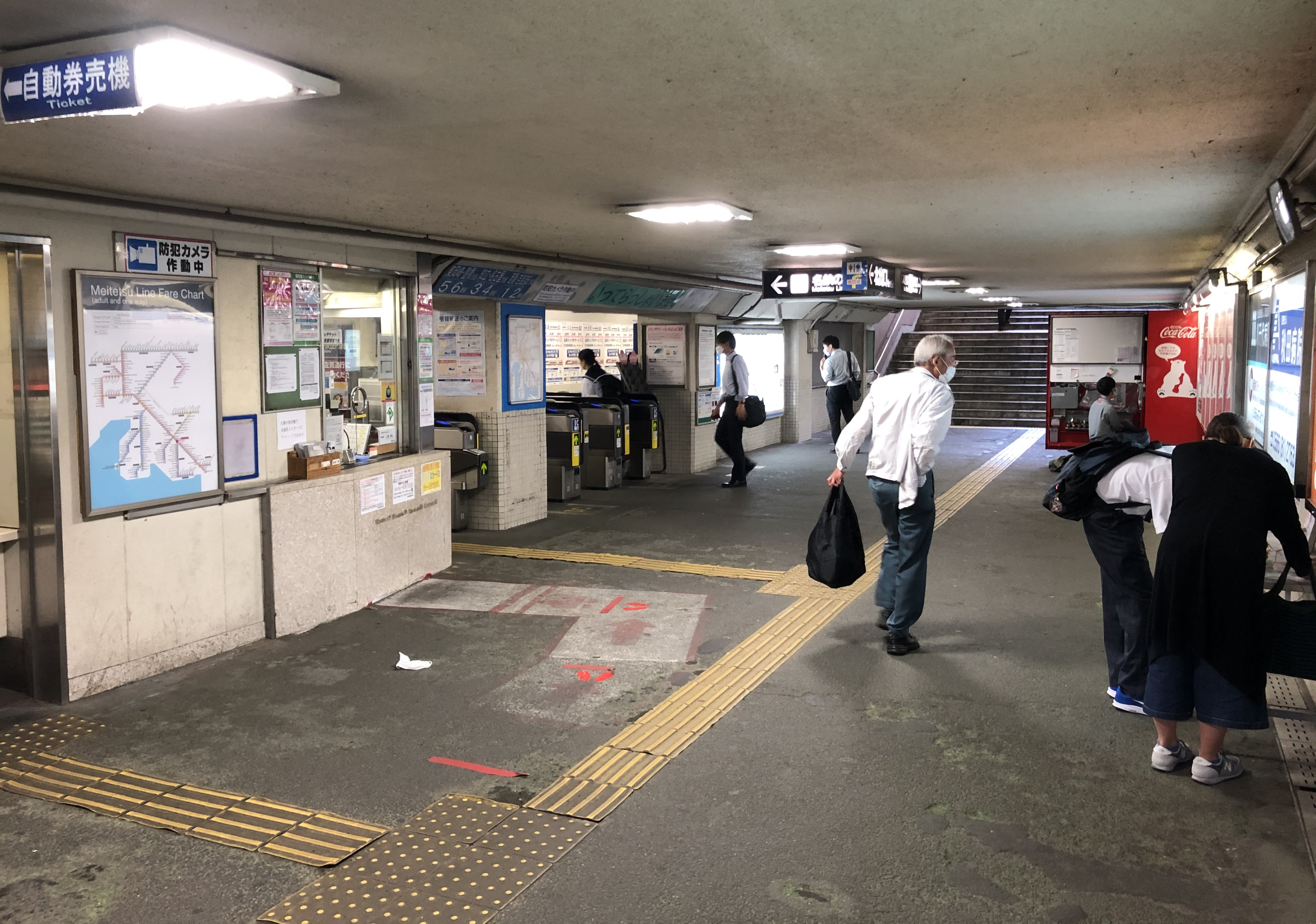 新安城駅の改札